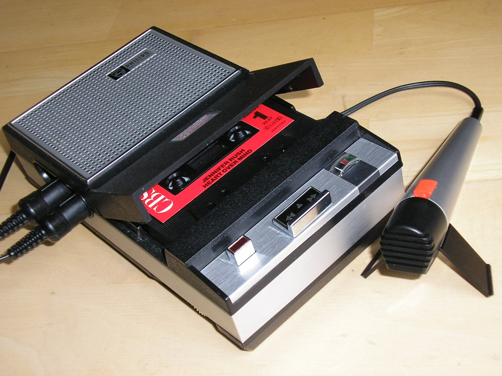 Philips Cassetten-Recorder EL 3302 (1968)